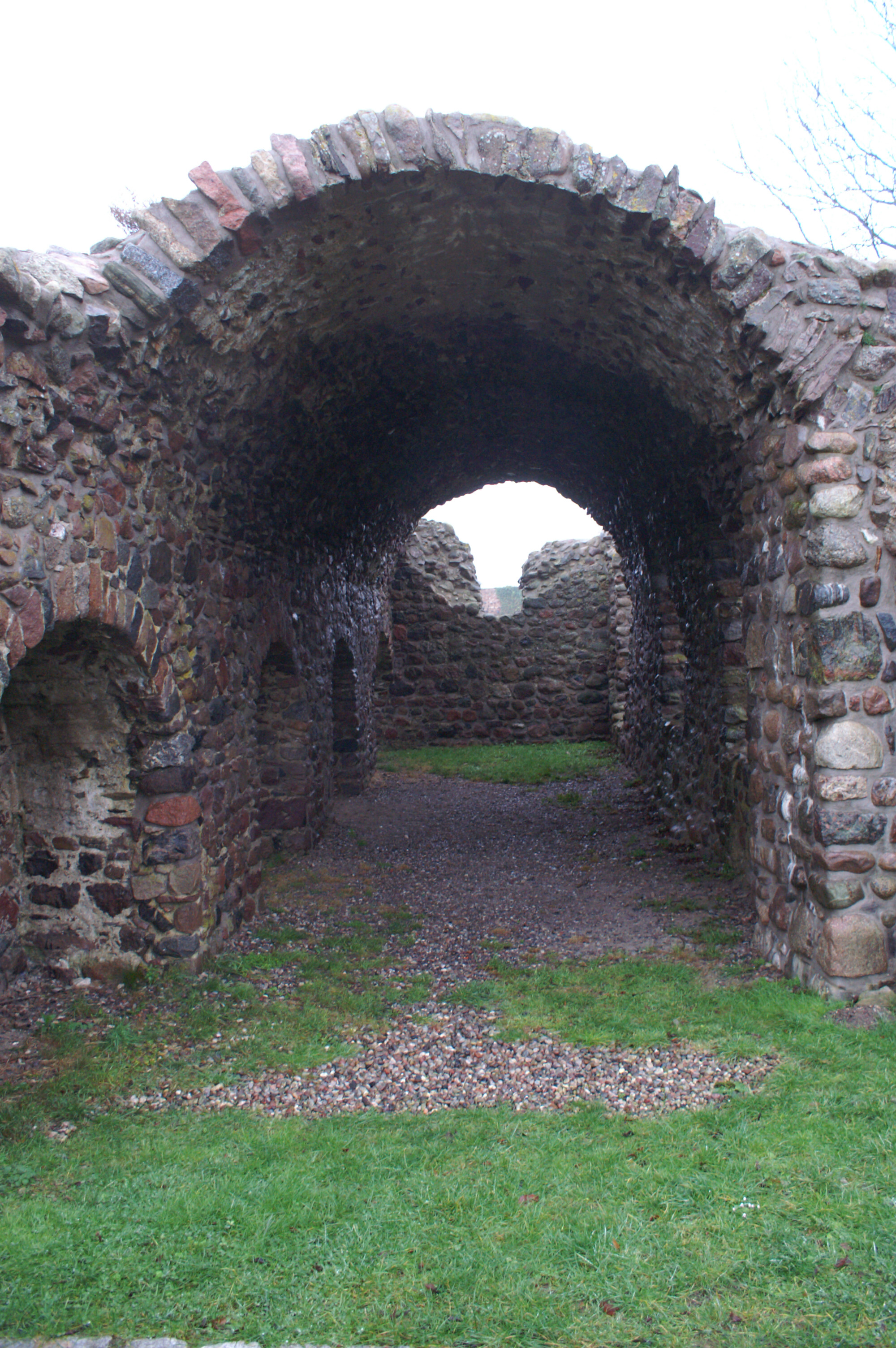 Gewölbe unter der Ruine des Westturmes der Klosterkirche St. Johannes